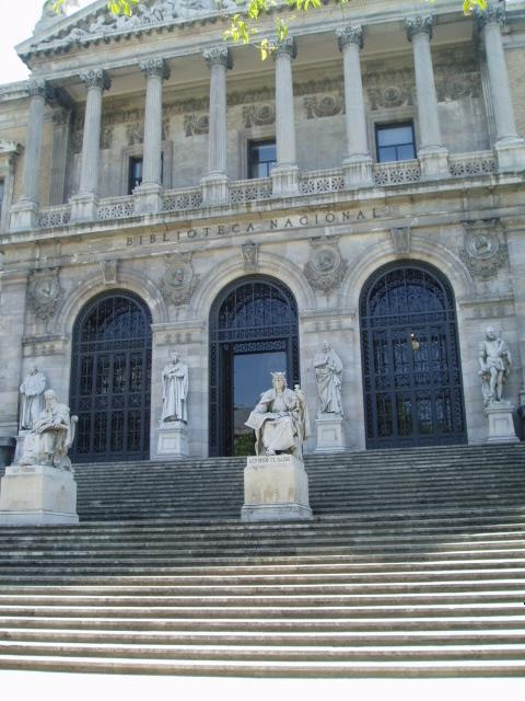 Biblioteca Nacional de España. Madrid. España.